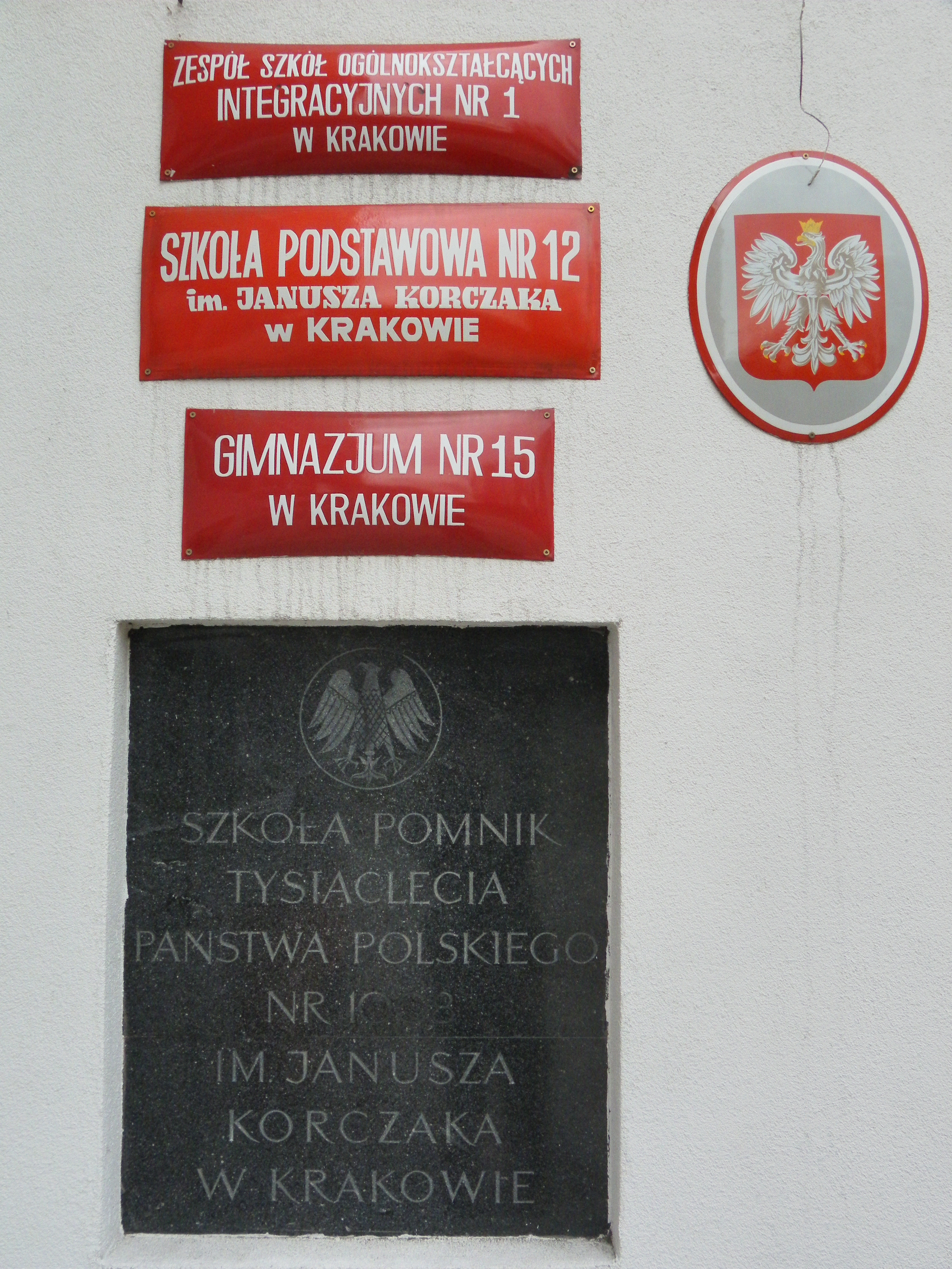 Tablice Zespołu Szkół Ogólnokształcących Integracyjnych nr 1 im. Janusza Korczaka w Krakowie przy al. Kijowskiej 3.